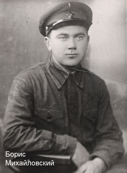 Подборка фотографий об А.Б.Михайловском